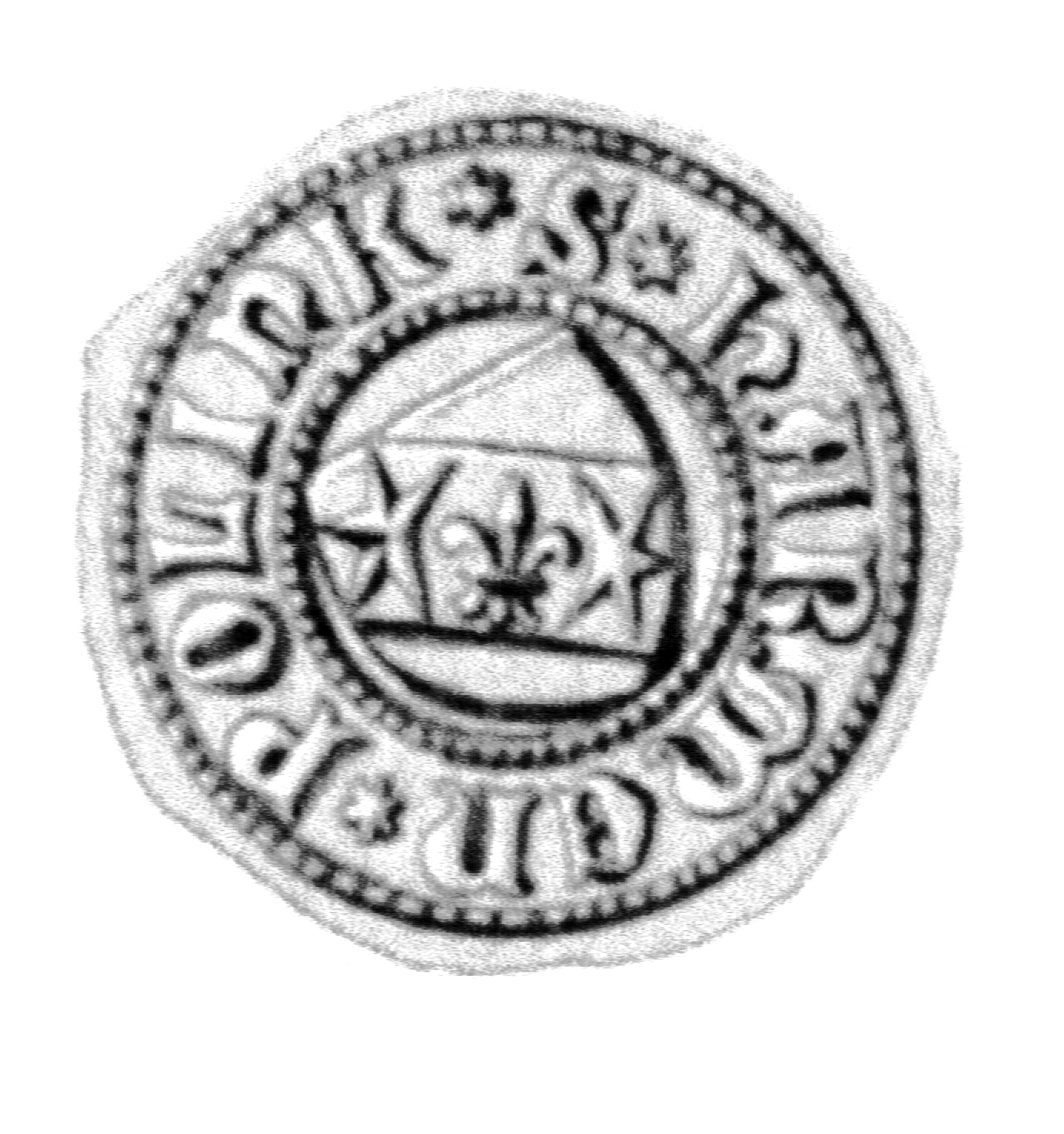 Siegel des Ratsmannes Hermann Poling. Das Siegel stammt aus der Zeit um 1411. Siehe Emil Ferdinand Fehling: Lübeckische Ratslinie, Nr. 485 (Hermann Poling).